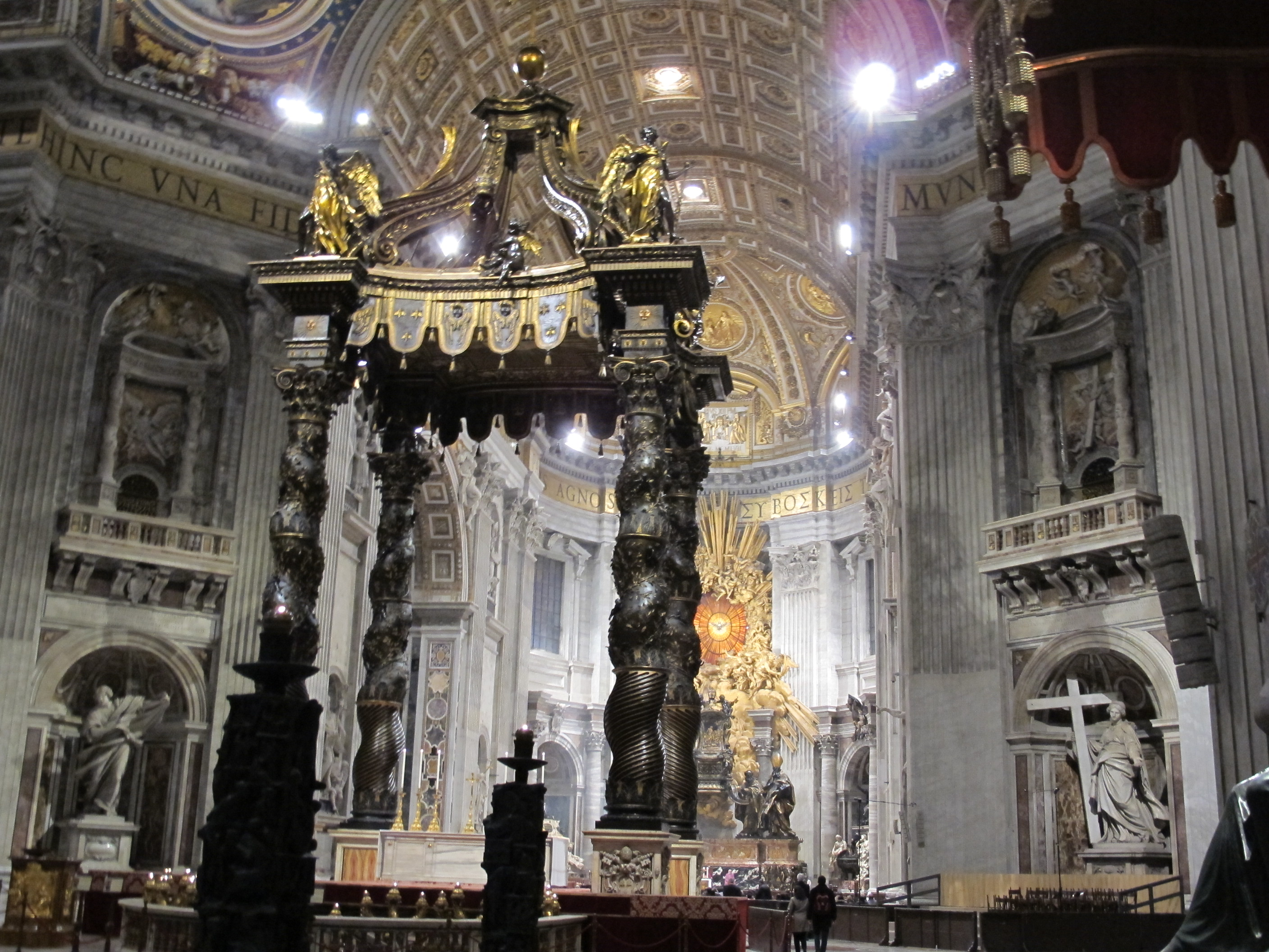 San pietro, baldacchino